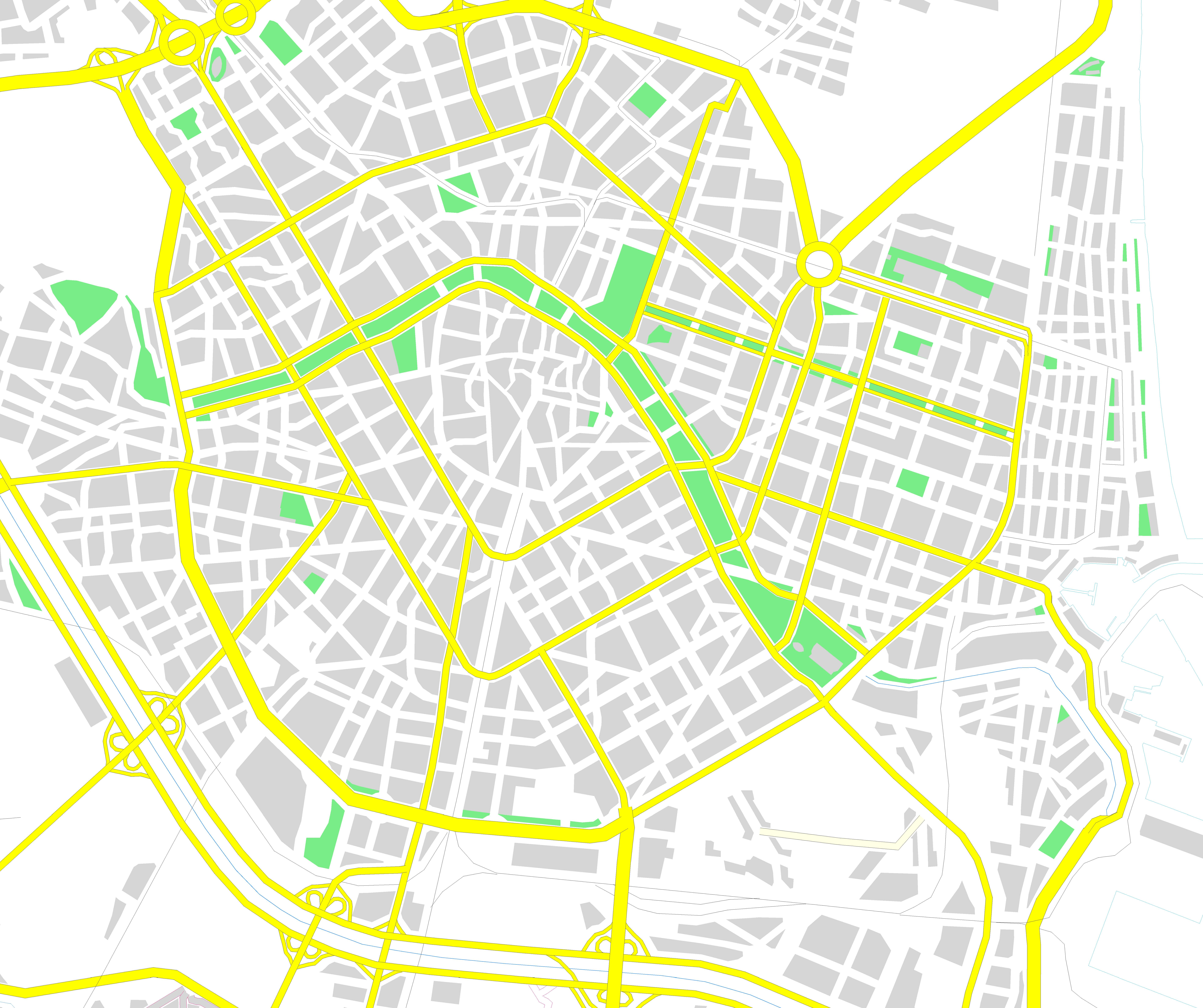 Plànol de la ciutat de València